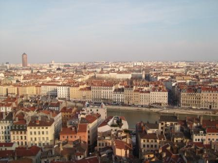 Vy över Lyon